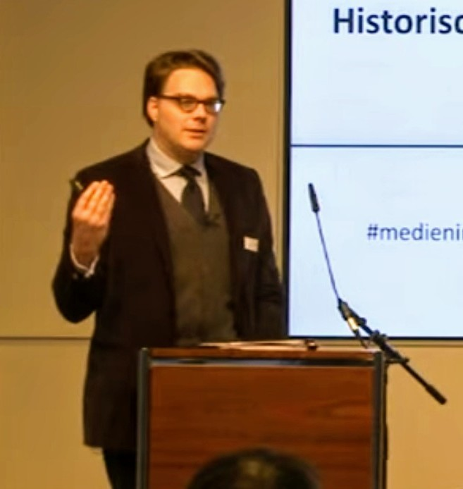 medien impuls am 26. November 2014: "Unbestimmter Rechtsbegriff mit bestimmten Folgen Der Schutz der Menschenwürde in den Medien" Die Würde des Menschen ist unantastbar – Historische und aktuelle Anmerkungen zum höchsten Gut unserer Verfassung Prof. Dr. Dr. Ino Augsberg Christian-Albrechts-Universität zu Kiel Weitere Informationen zum Referenten und zur Veranstaltung finden sich hier